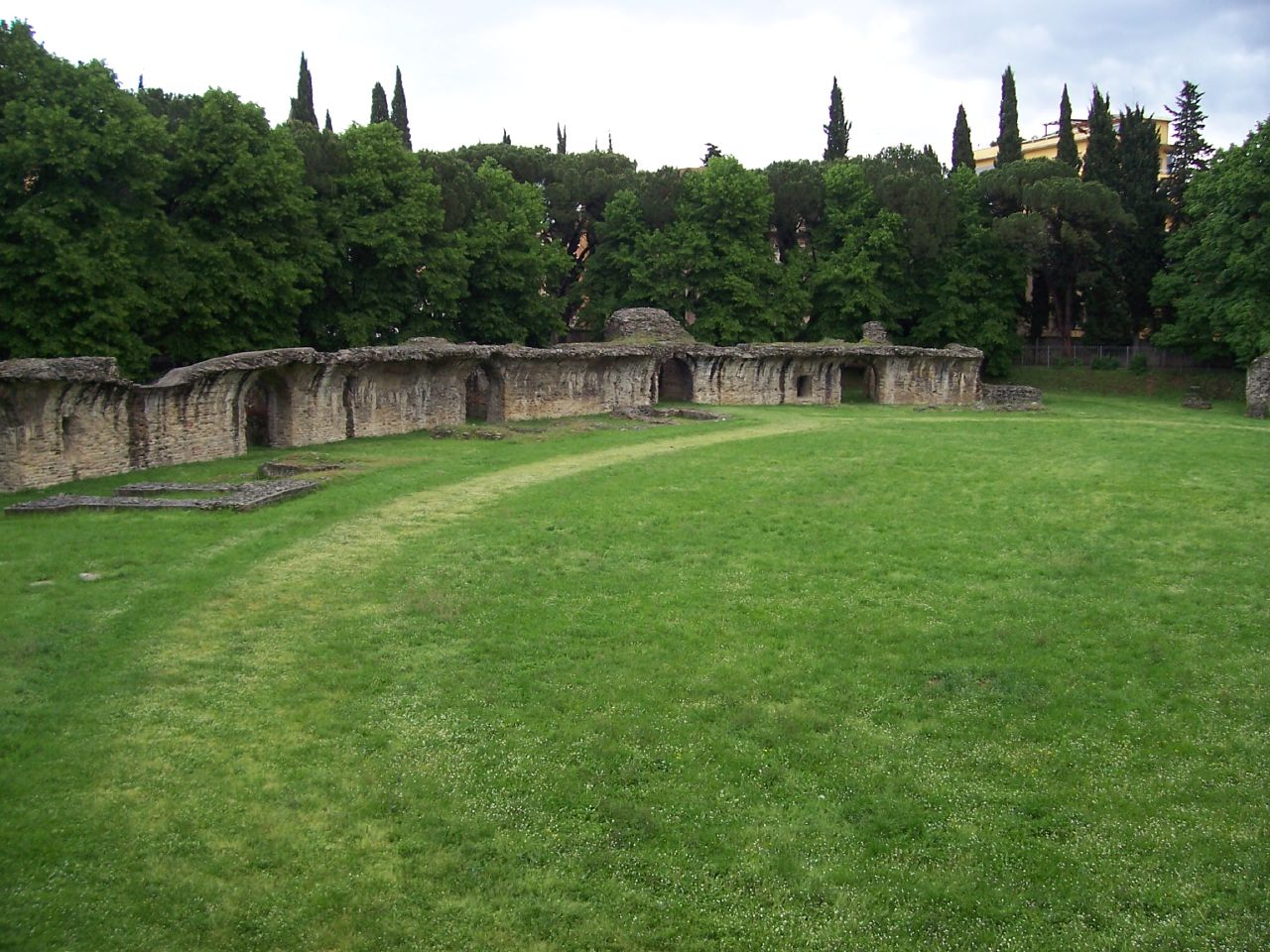 L'anfiteatro romano di Arezzo, Toscana, Italia.Amfiteatro4